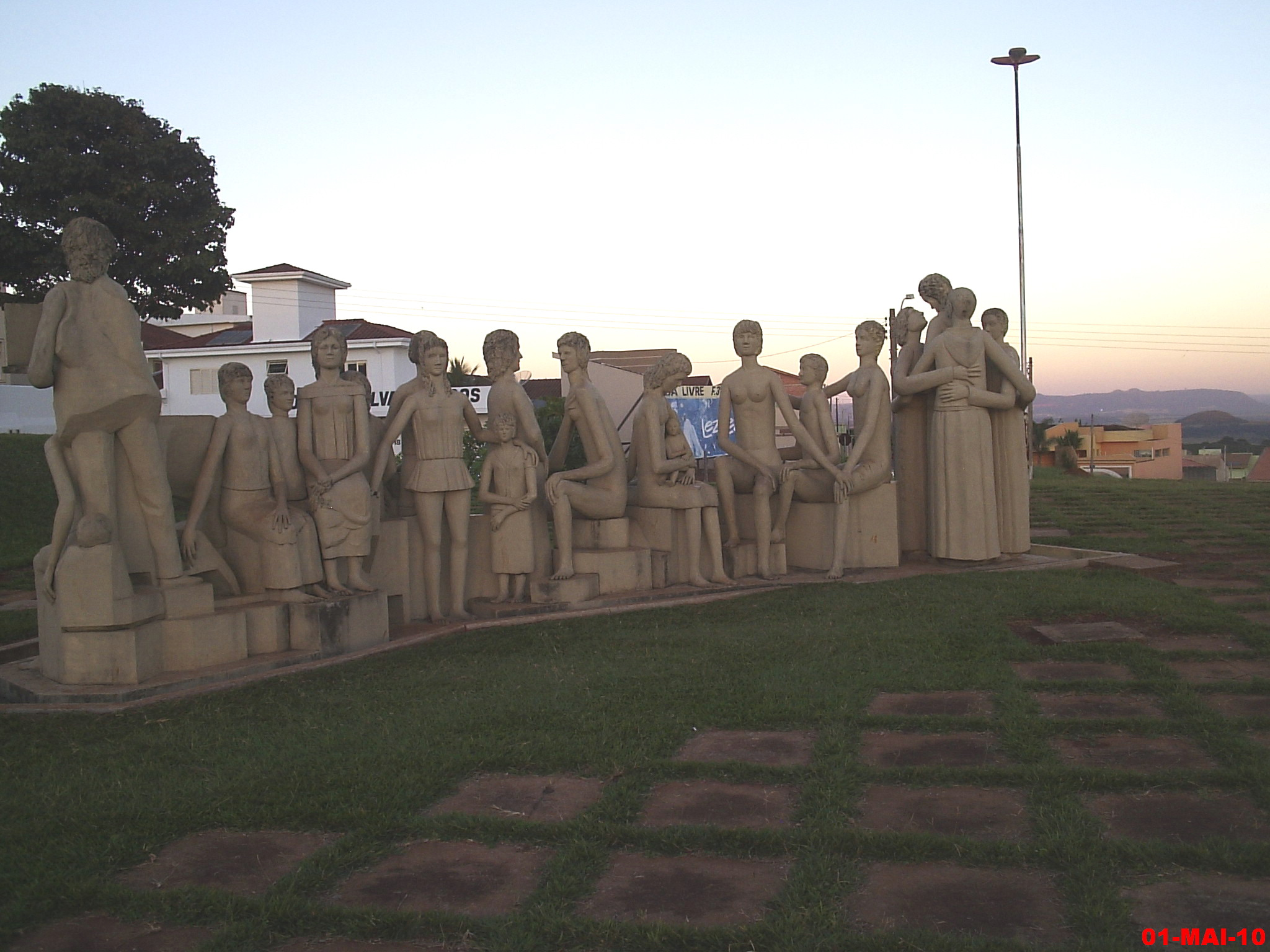 Escultura de Bassano Vaccarini no Jardim das Esculturas em Altinópolis - 3° Maior museu ao ar livre do mundo